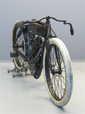 Indian 8 Valve Board Track racer from 1915.